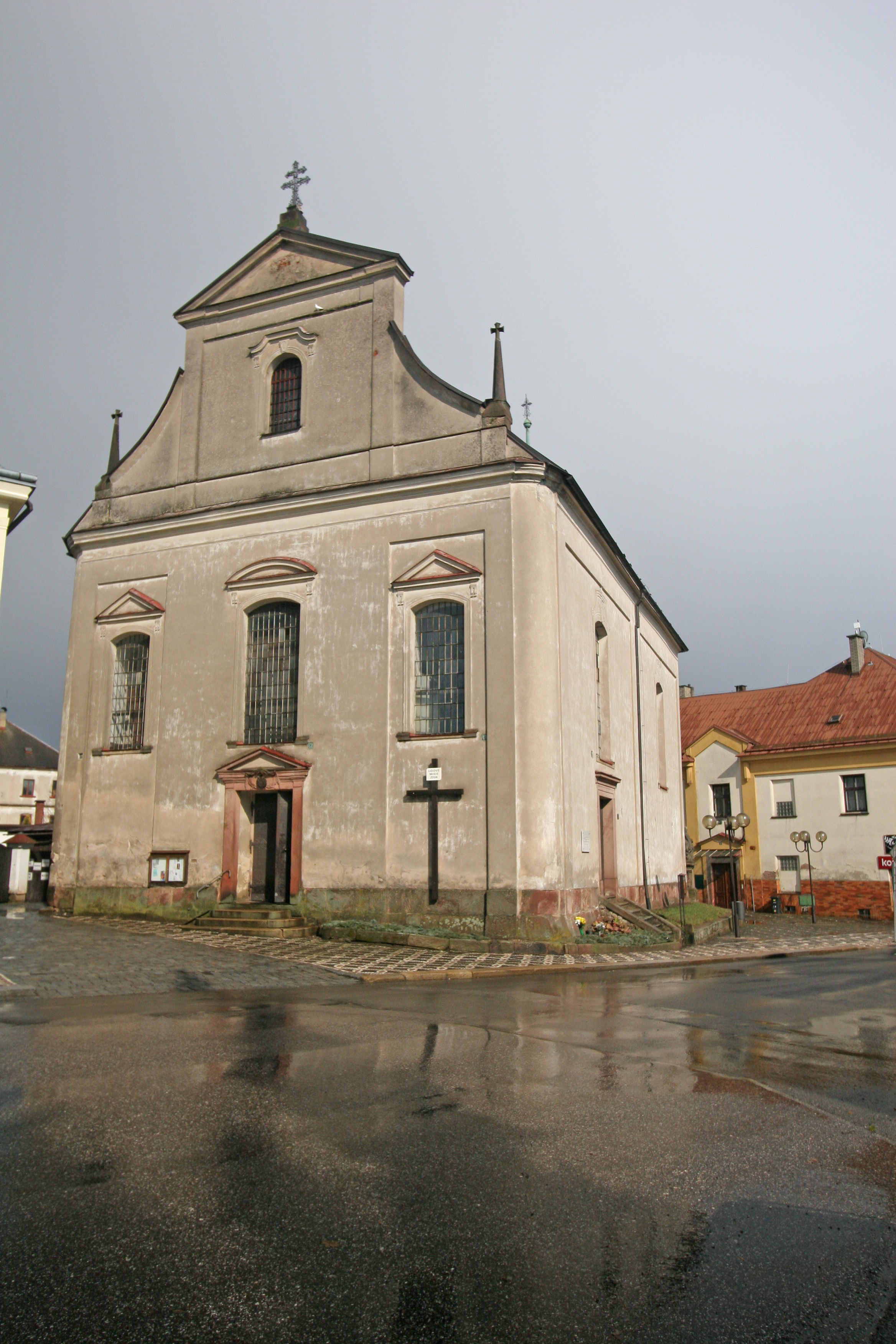 Kostel sv. Mikuláše (Lomnice nad Popelkou), nám., Lomnice nad Popelkou